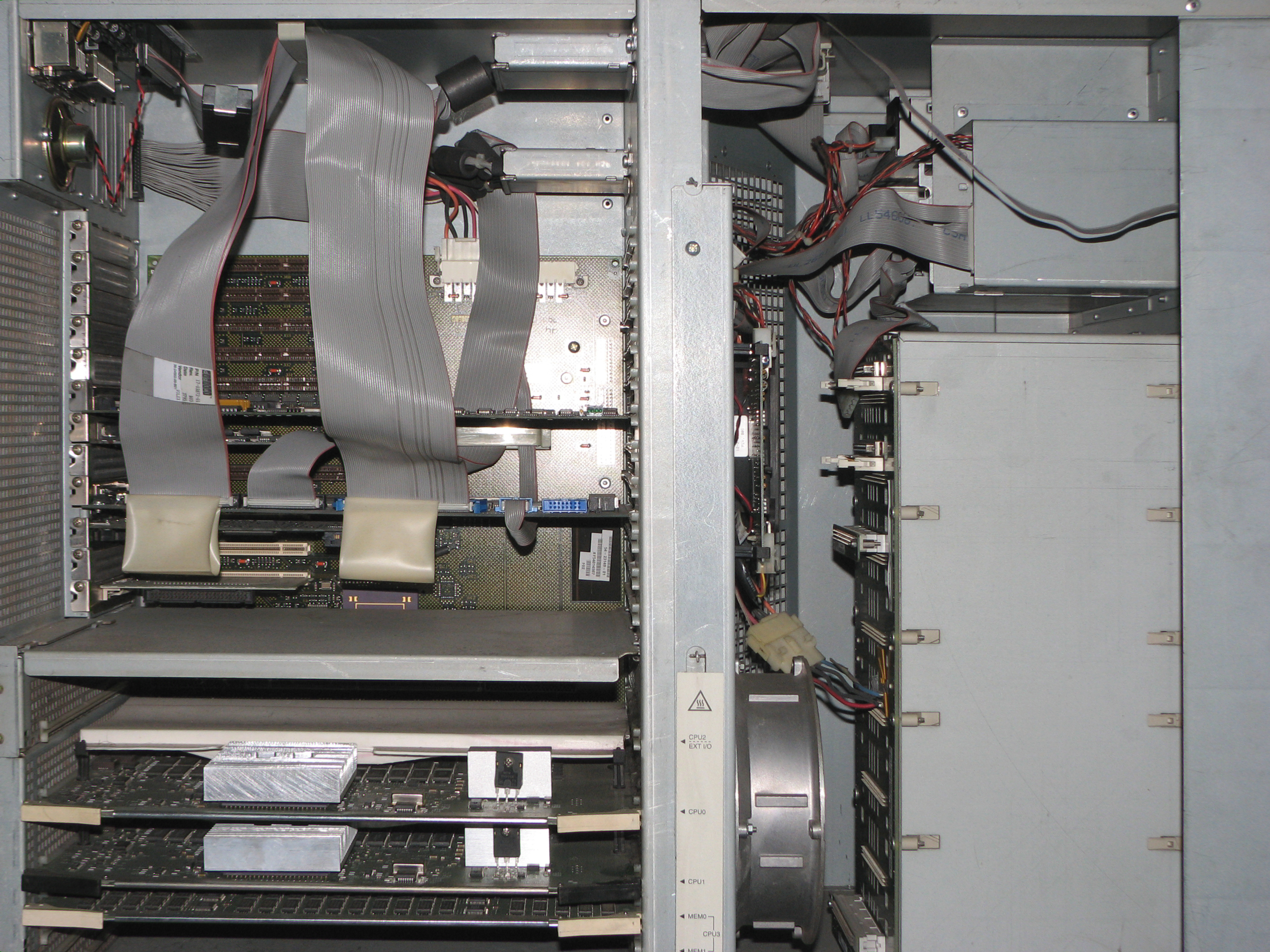 Inside view of DEC AlphaServer 2100.